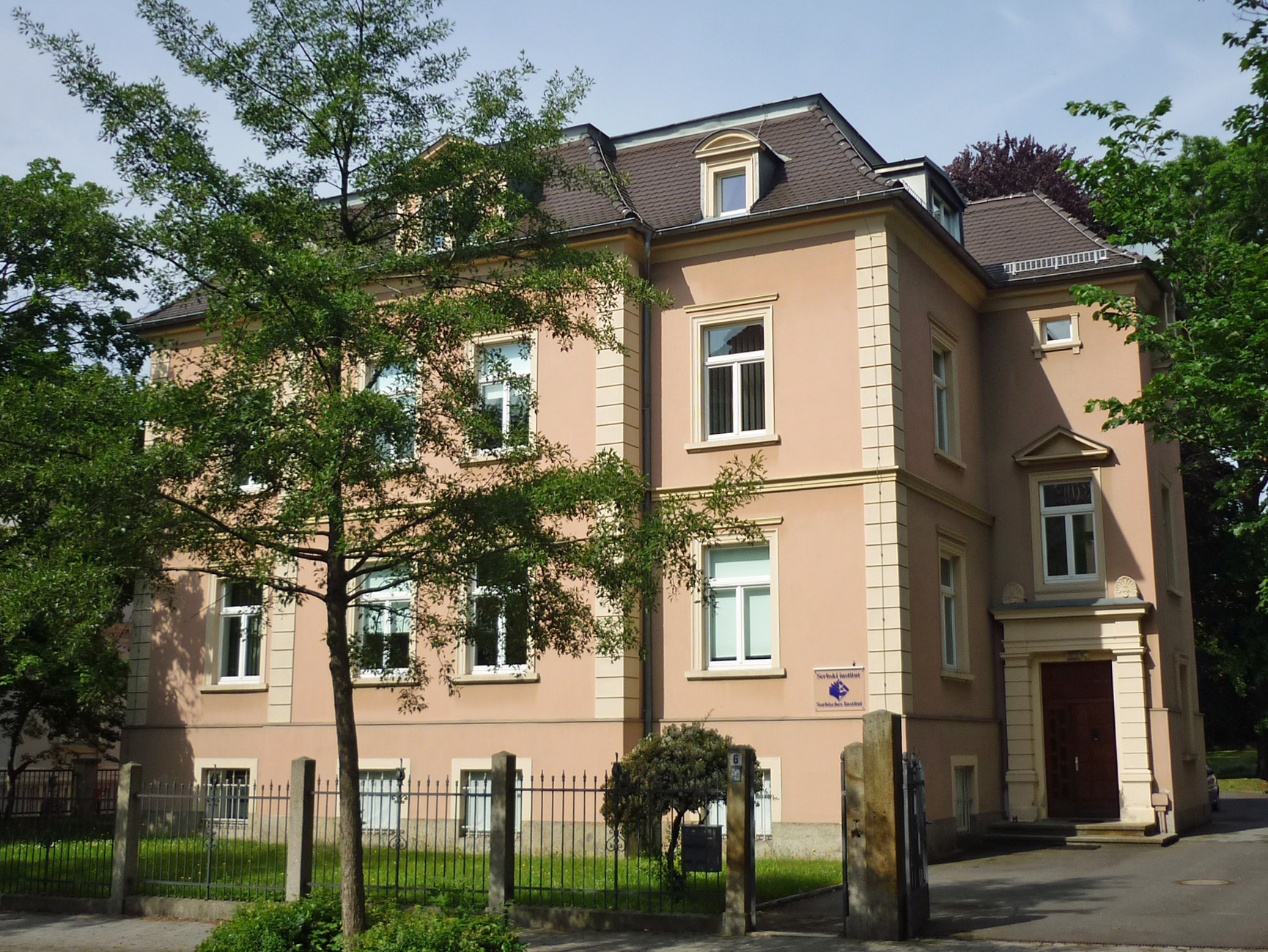 Haus Bahnhofstraße 6 in Bautzen, Sitz des Sorbischen Instituts Hornjoserbsce: Dwórnišćowa 6 w Budyšinje, sydło Serbskeho instituta Dolnoserbski: Dwórnišćowa 6 w Budyšynje, sedło Serbskego instituta